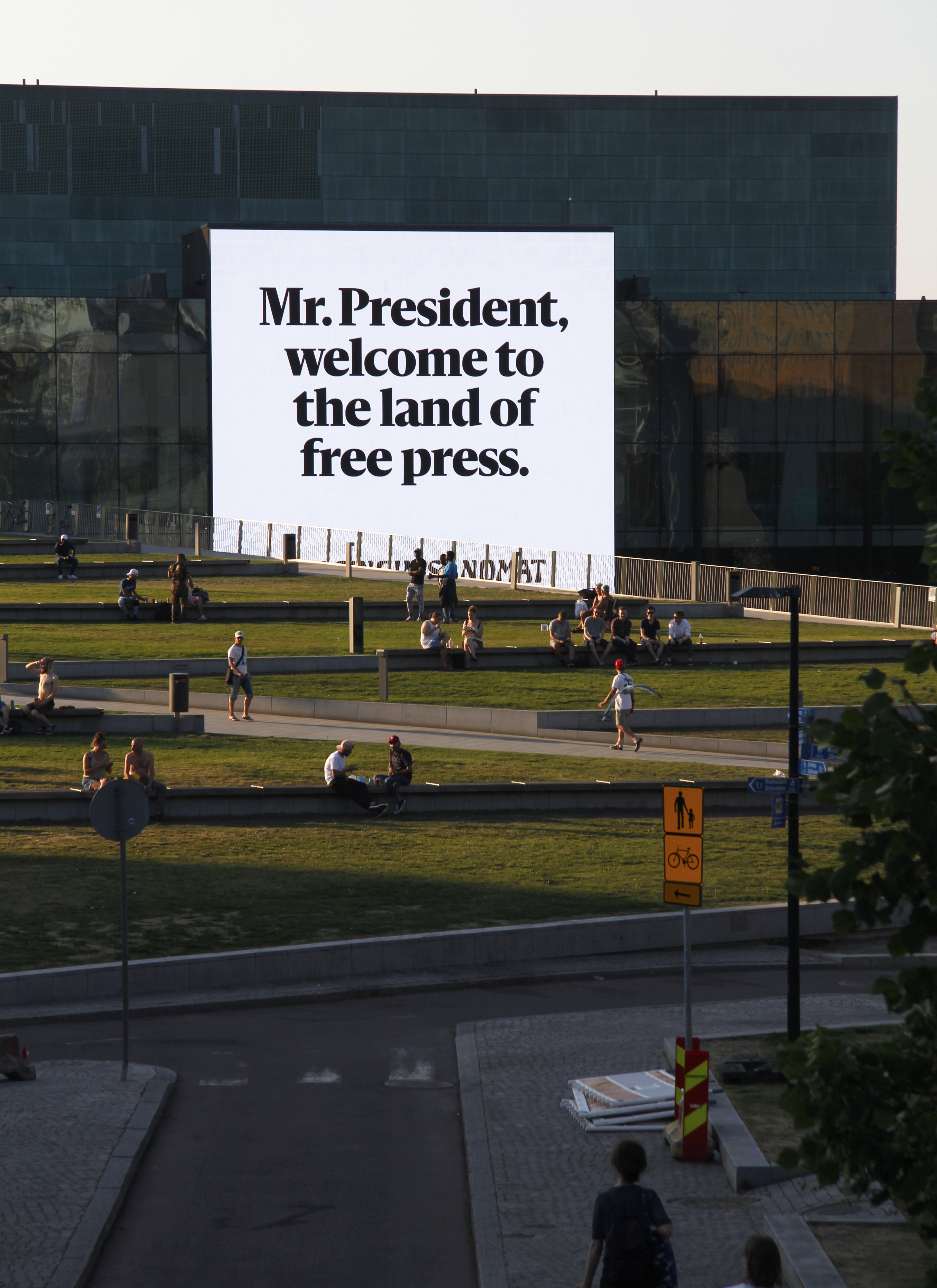 Yhdysvaltain presidentin Donald Trumpin ja Venäjän presidentin Vladimir Putinin Helsingin-tapaamisen yhteydessä esillä ollut Helsingin Sanomien mainostaulu Musiikkitalon edustalla.